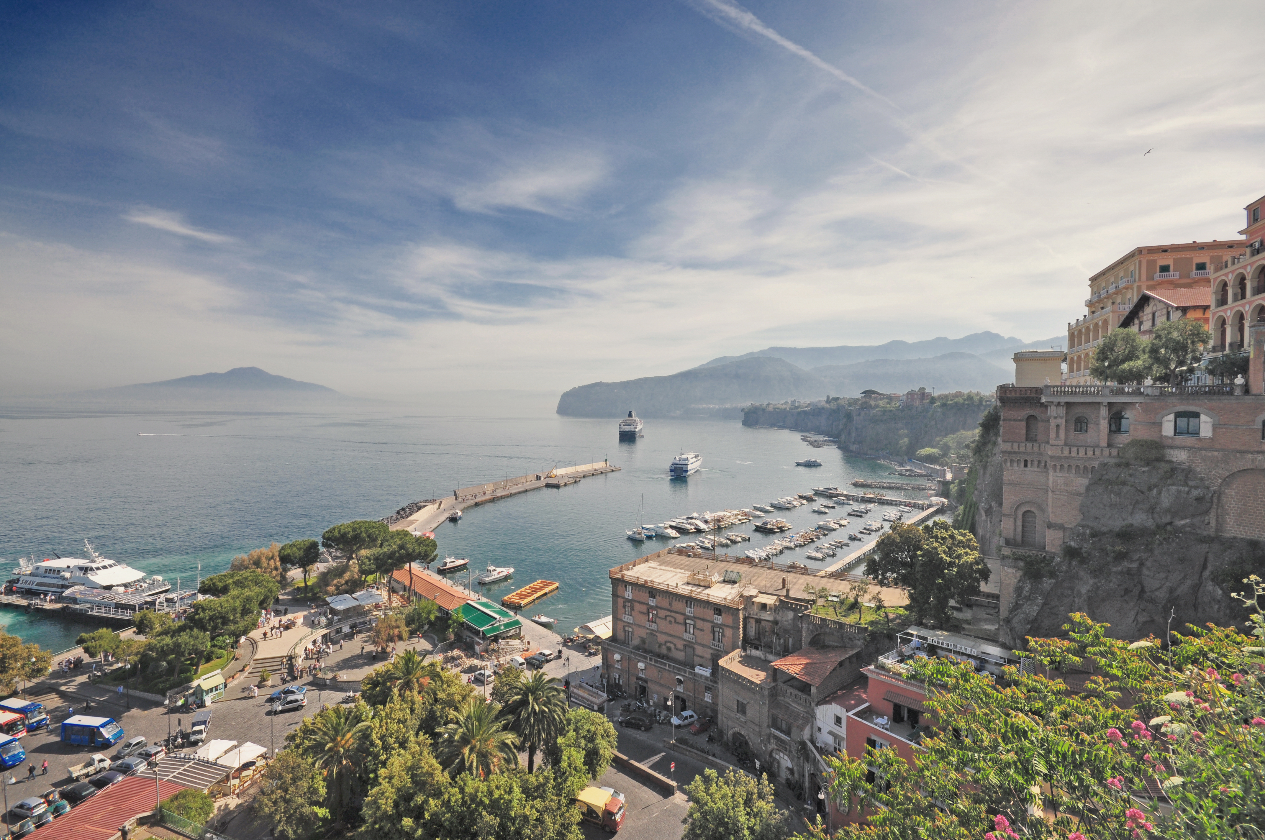 sorrento